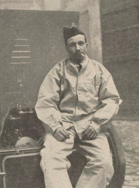 Le pilote automobile Albert Clément fumant une cigarette pendant son service militaire